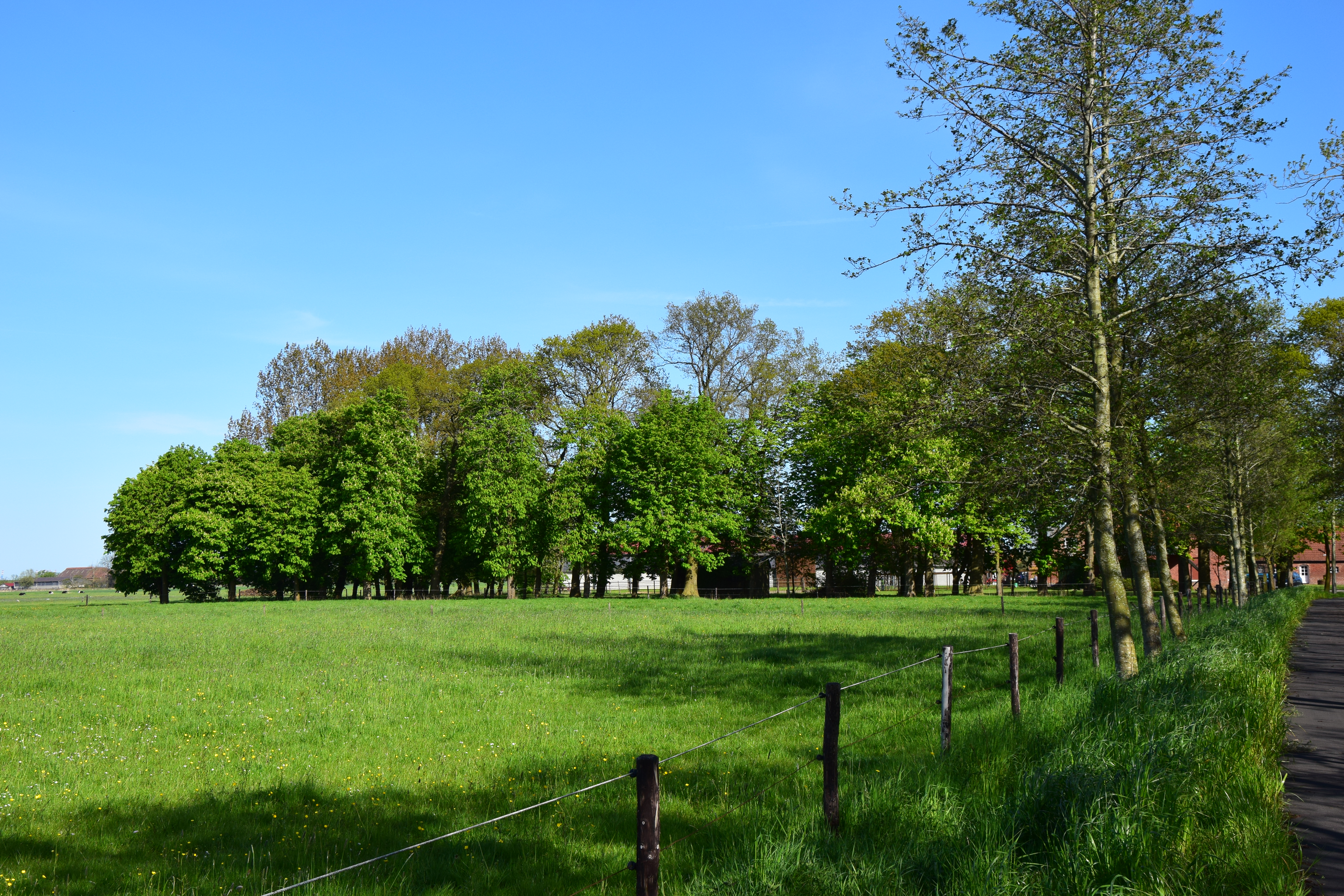 Auf dem Foto ist das Naturschutzgebiet „Sinsum/Burhave“ (NSG WE 096) in Butjadingen zu sehen. Seit dem 12. April 1980 ist das Gebiet unter Naturschutz. Das Gebiet hat eine größe von 3,1 Hektar und befindet sich nordwestlich von Burhave, an der L860. Das Schutzgebiet dient zum Schutz der alten Graureiher-Kolonie, die seit vielen Jahren in den Baumkronen, in der Nähe eines Bauernhofes existiert.